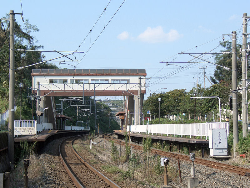 JR鹿児島本線崇城大学前駅 構内 写真手前が熊本駅方面。 撮影者/著者/著作権保有者 : MK Products (本人がアップロード) 撮影日 : 2006/09/24 崇城大学前駅用にアップロードした画像です。良い画像があれば別の画像に変えてください。